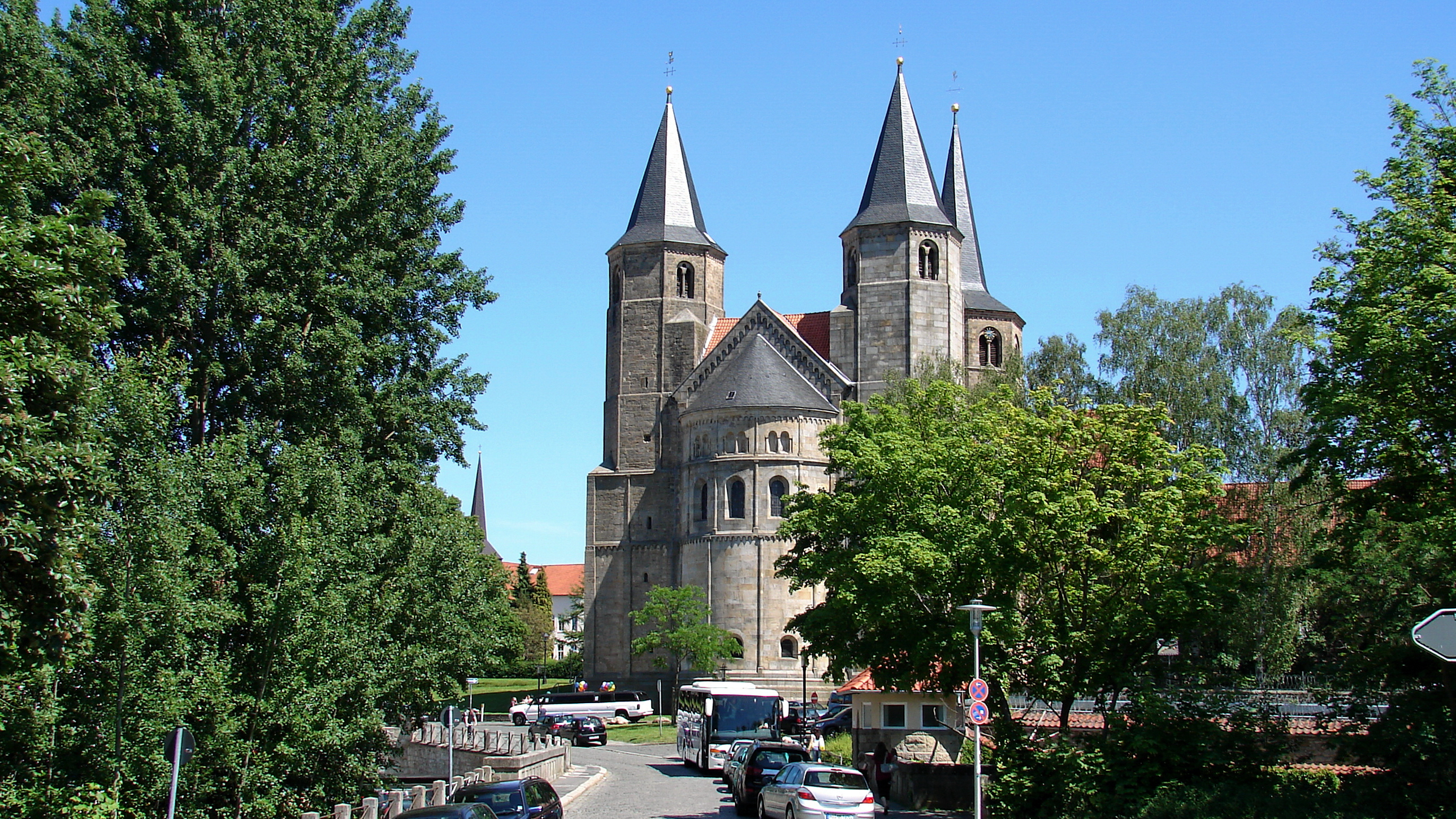 Die Basilika St. Godehard ist eine romanische ehemalige Benediktiner-Klosterkirche am Südrand der Altstadt von Hildesheim.